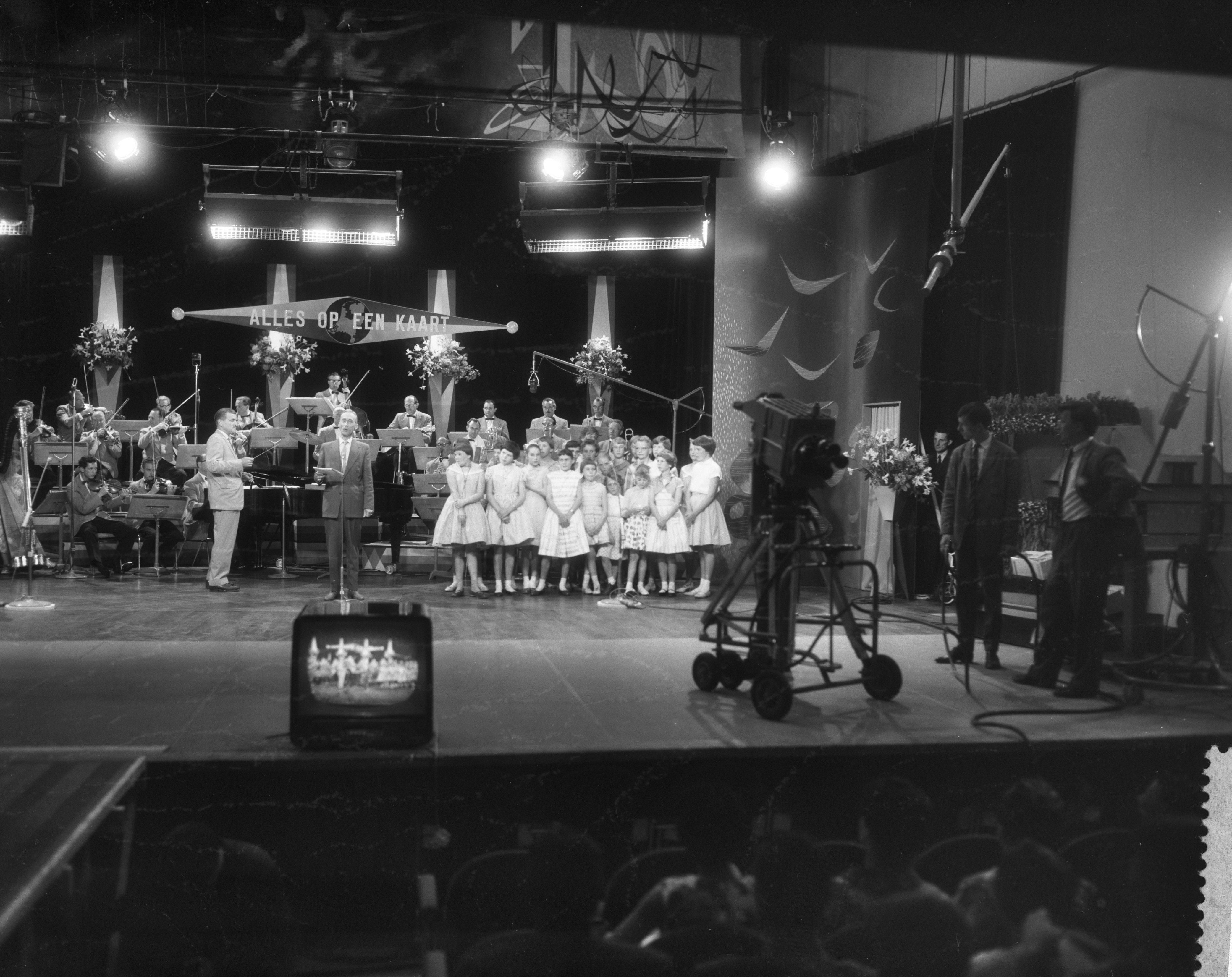 Collectie / Archief : Fotocollectie Anefo Reportage / Serie : Slotuitzending van de actie "Alles op een kaart" Beschrijving : Kinderkoor Jacob Hamel Datum : 28 mei 1959 Trefwoorden : inzamelingen, koren, televisieprogramma's Fotograaf : Pot, Harry / Anefo Auteursrechthebbende : Nationaal Archief Materiaalsoort : Negatief (zwart/wit) Nummer archiefinventaris : bekijk toegang 2.24.01.04 Bestanddeelnummer : 910-4012